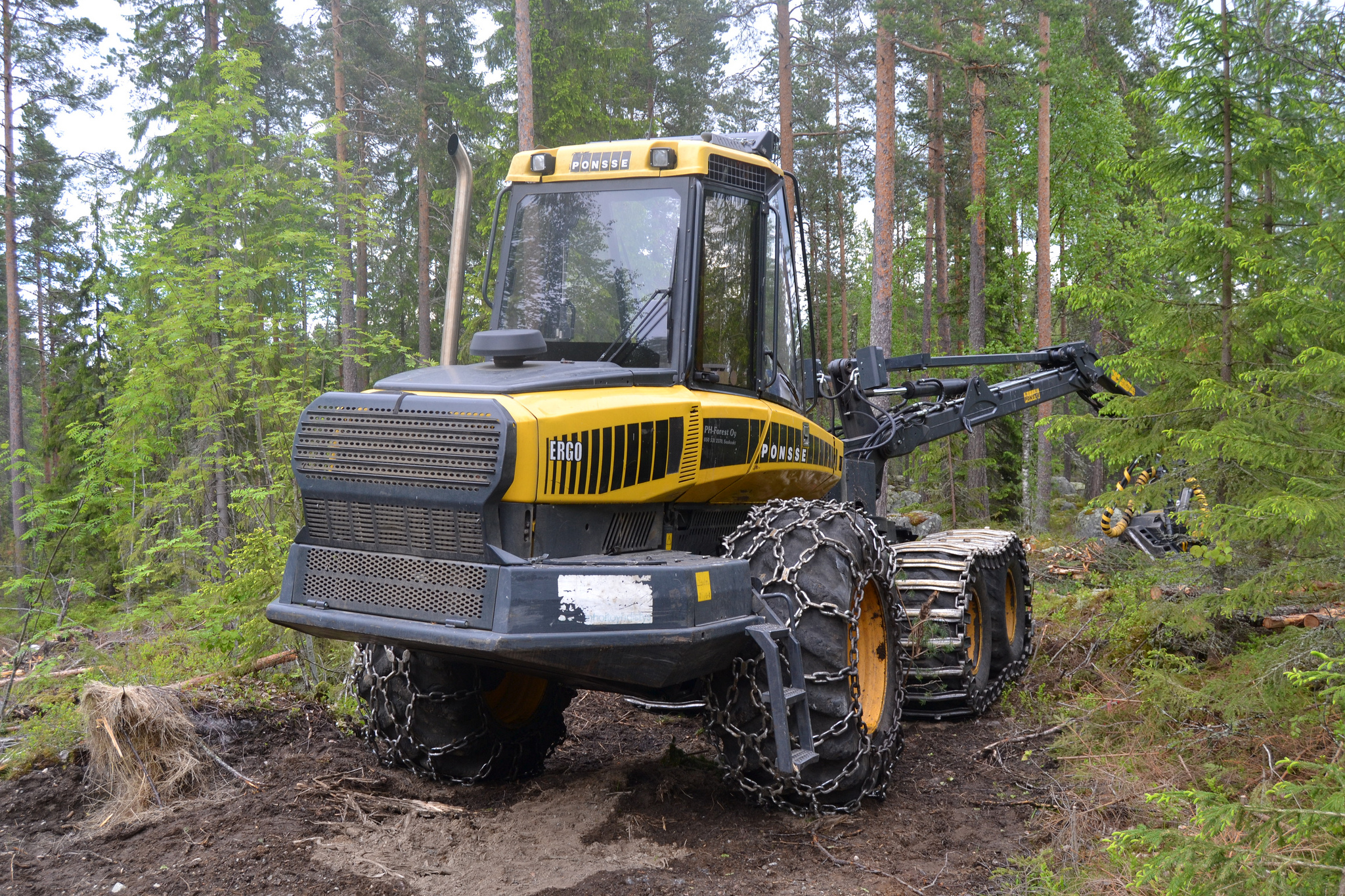 Ponsse Ergo harvester in Finland